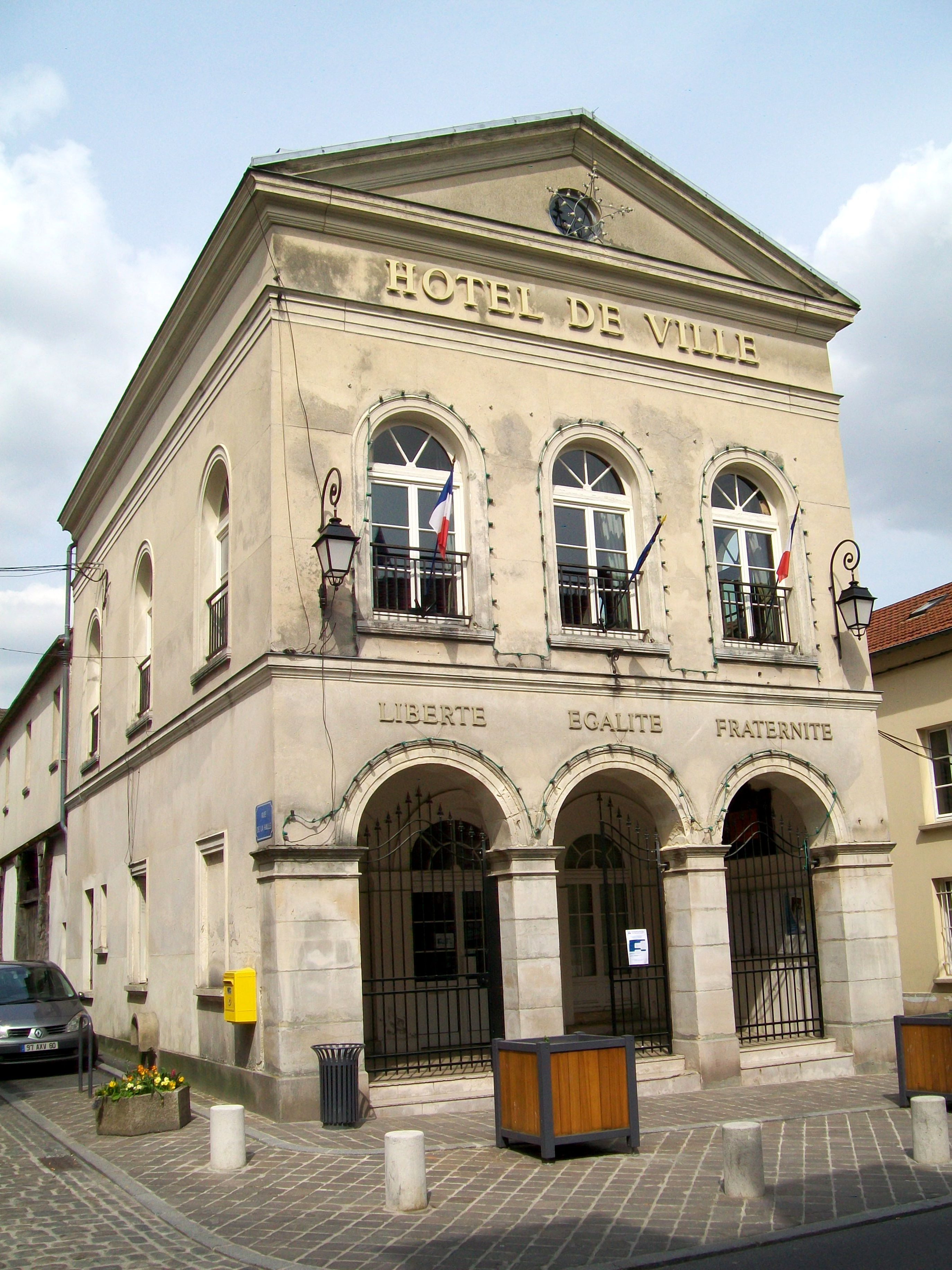 L'hôtel de ville de Dammartin.